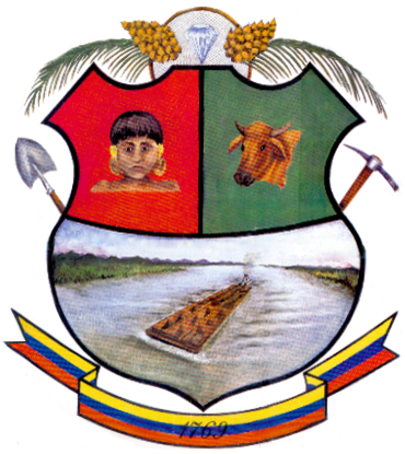 Escudo del municipio Cedeño. Estado Bolívar. Venezuela